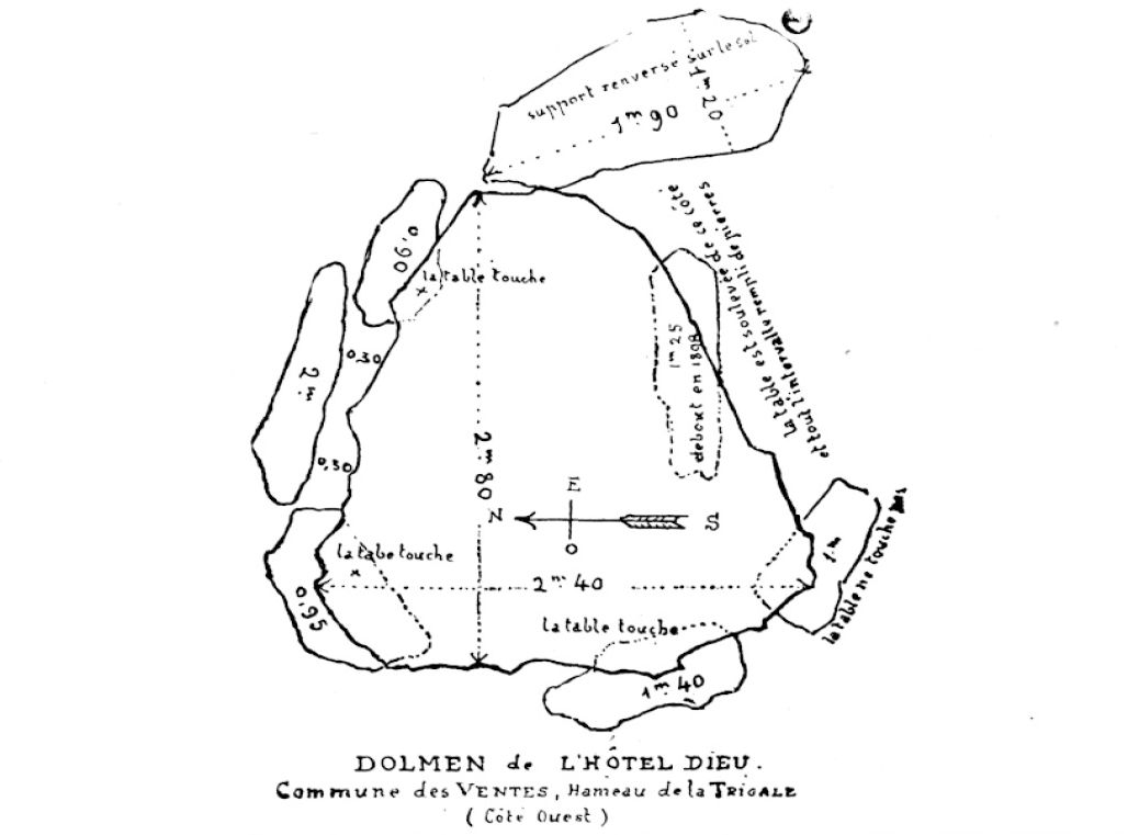 Croquis du dolmen de l'Hôtel-Dieu aux Ventes dressé par Coutil en 1898 et publié en 1909